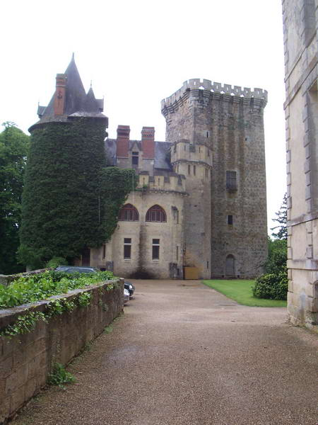 Vieux château de Saint-Loup-sur-Thouet (79) et sa tour maîtresse.